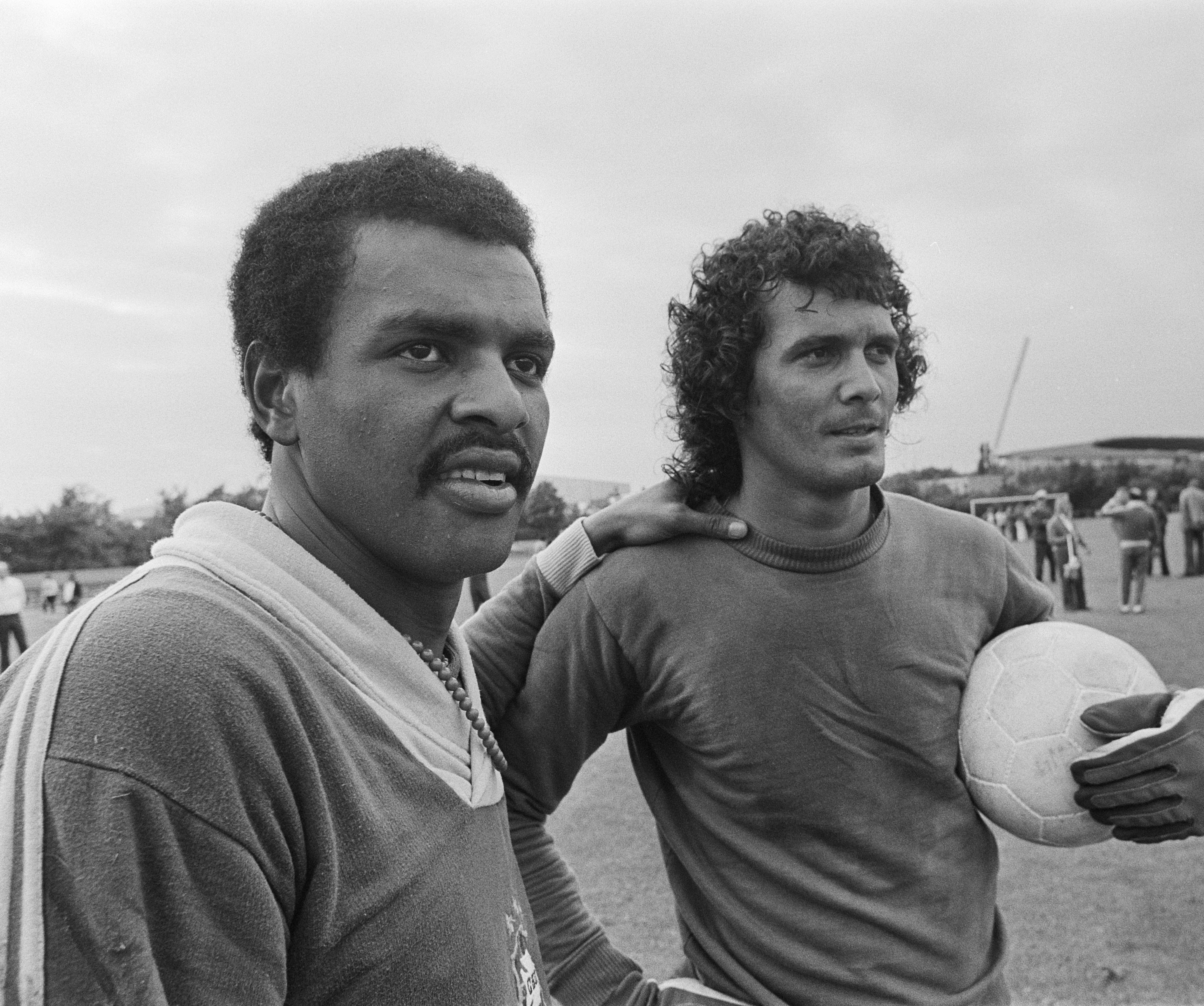 WK 74, training Brazilie; Pereira (l) en Wendell Lucena (r)